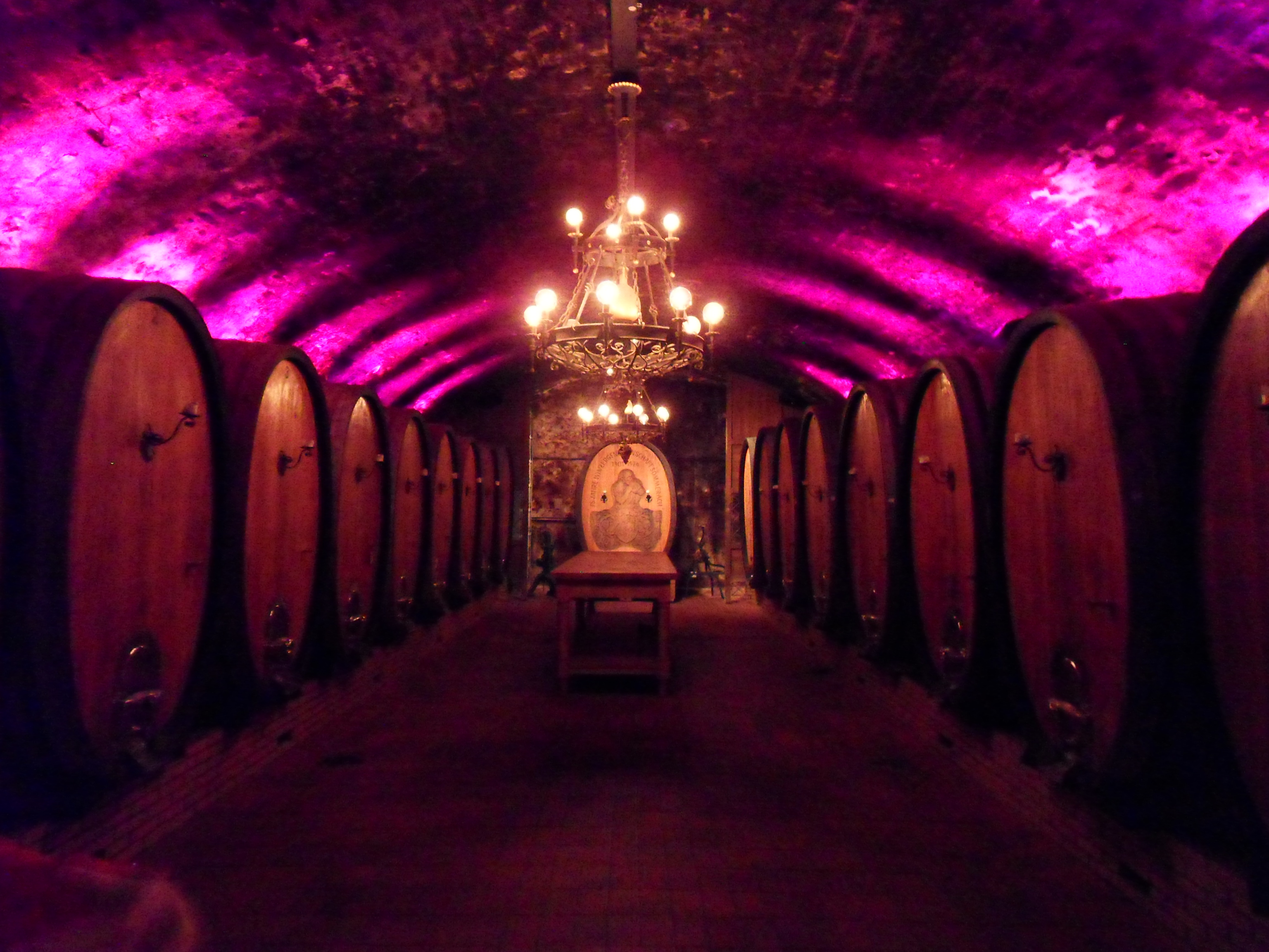 Schau-Keller im historischen Genossenschaftsgebäude des Winzerkellers Sommerach mit traditionellen Weinfässern zu je 5 bis 6 Fuder Inhalt